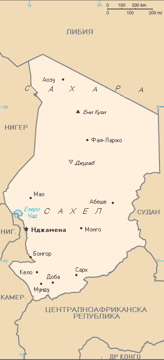 Карта на Чад на български